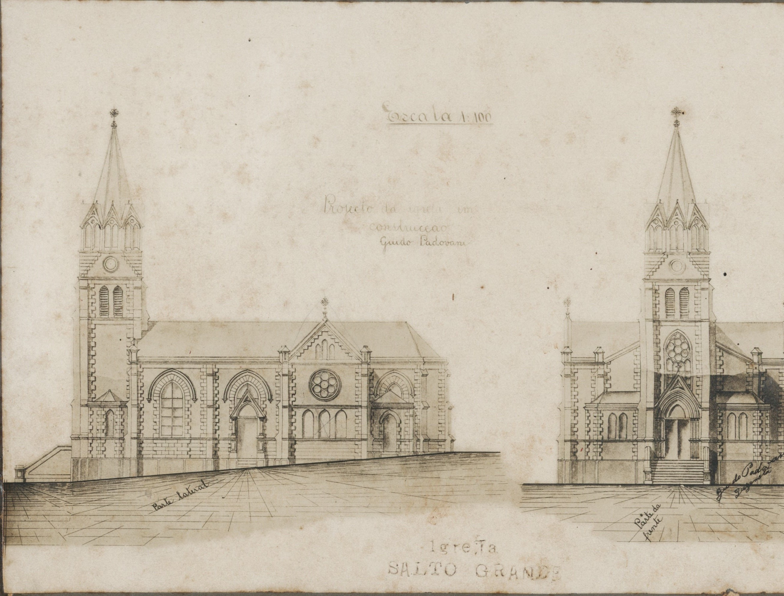 Projeto da Igreja Matriz N. Sra. do Patrocínio.